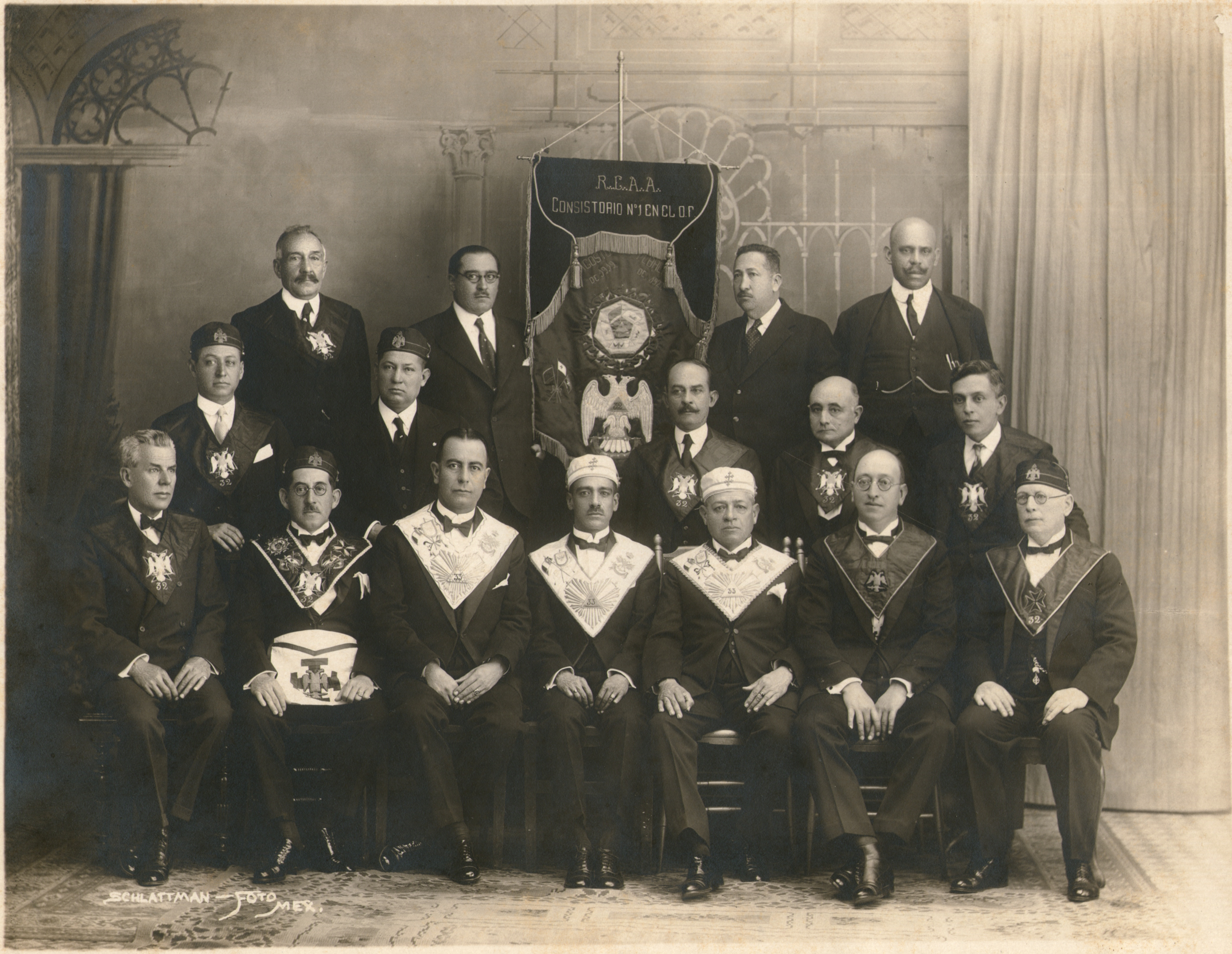 EN LA LOGIA MASONICA (AL CENTRO A LA DERECHA)